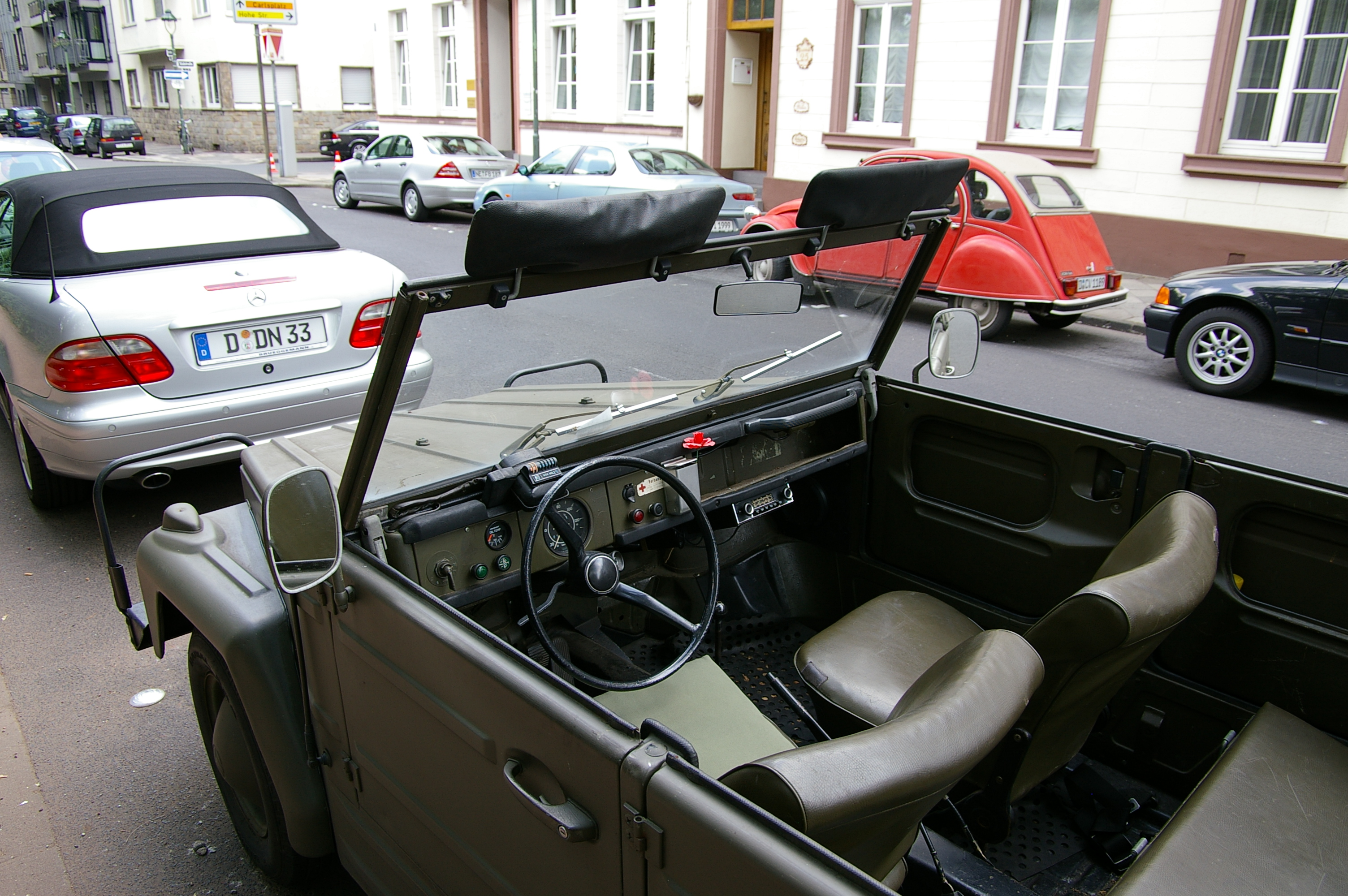 VW Kurierwagen Genehmigung: GFDL (Version 1.2, November 2002), kein wie auch immer geartetes "Gentlemen-Agreement". Bildnutzung ohne Einhaltung der Bestimmungen der GFDL ist kostenpflichtig und wird vom Rechteinhaber in Rechnung gestellt. Zweitlizensierung ggf. auch unentgeltlich auf Anfrage. Es gelten die AGB.